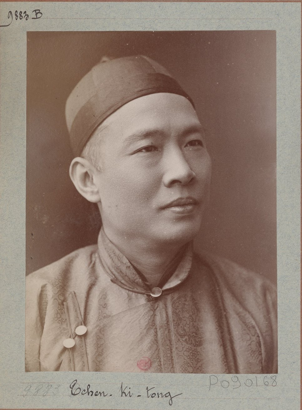 Tchen-Ki-tong : [photographie, tirage de démonstration] / [Atelier Nadar]